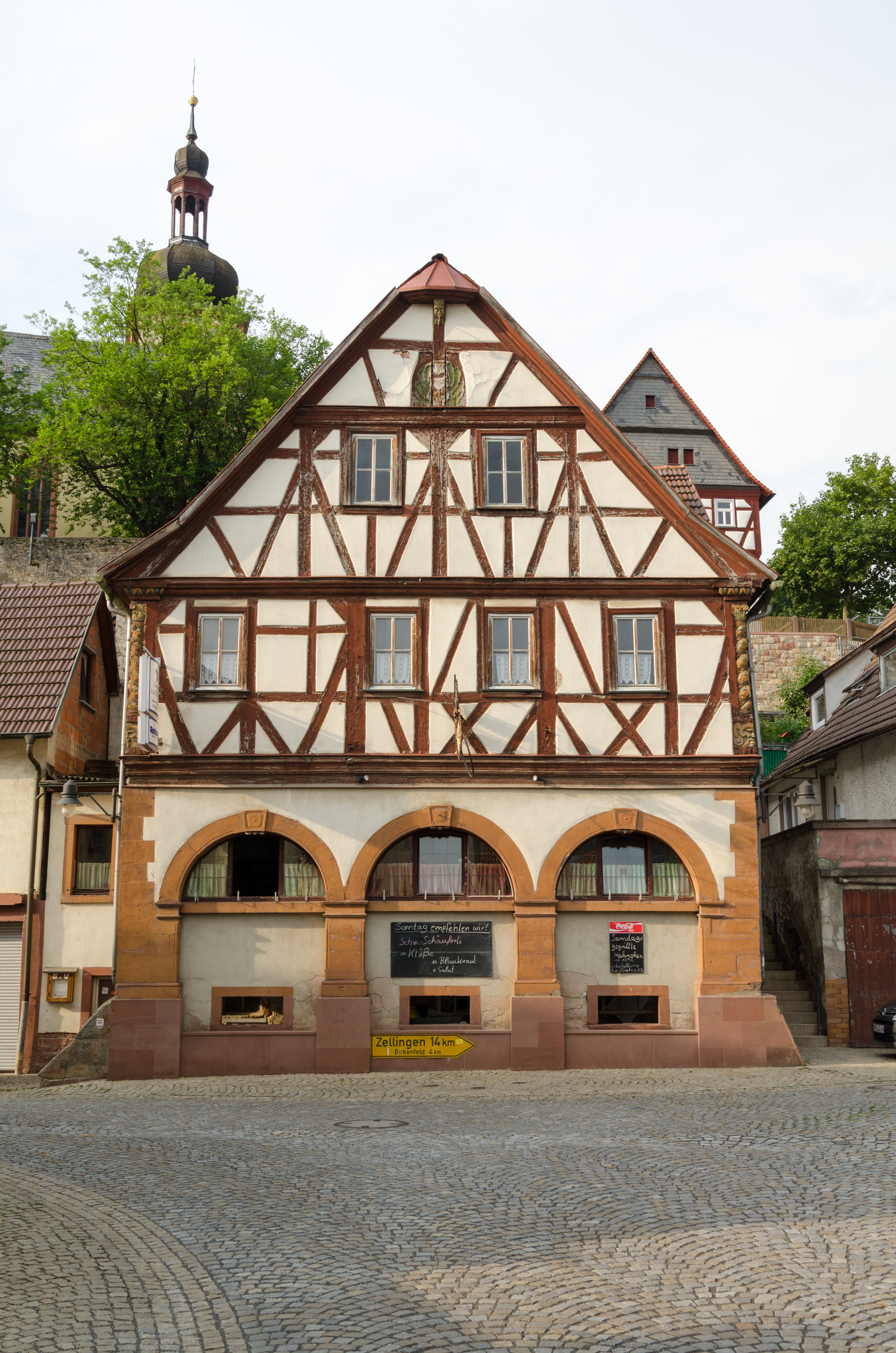 Karbach, Hauptstraße 33